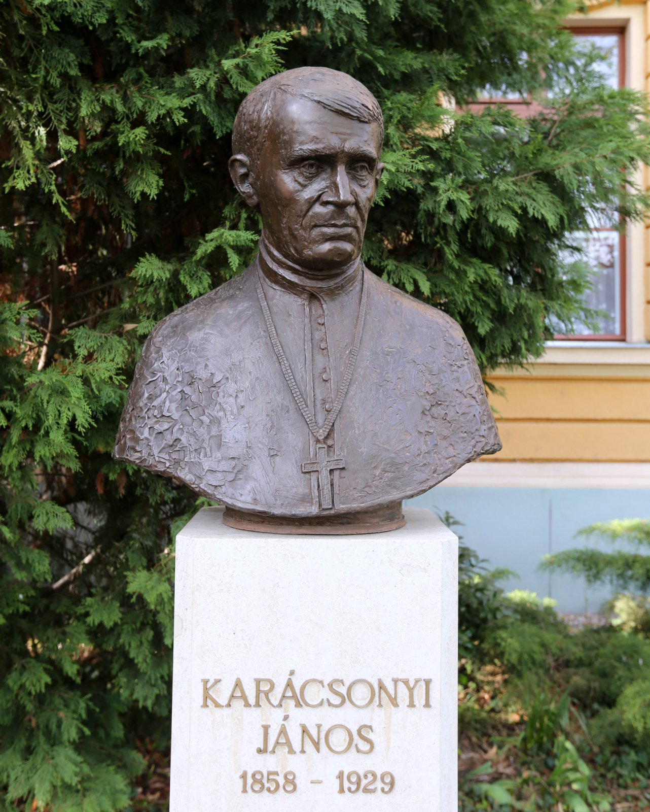 Karácsonyi János szobra Gyulán, a róla elnevezett gimnázium előtt